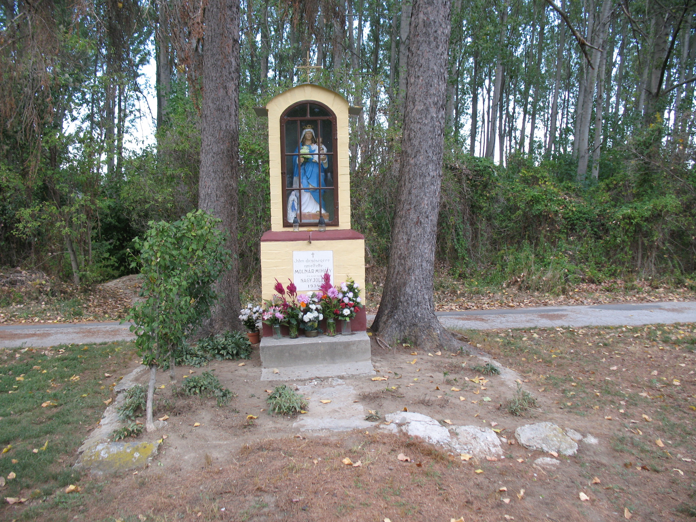 Ifjuságfalva Kissziget Szűzanya